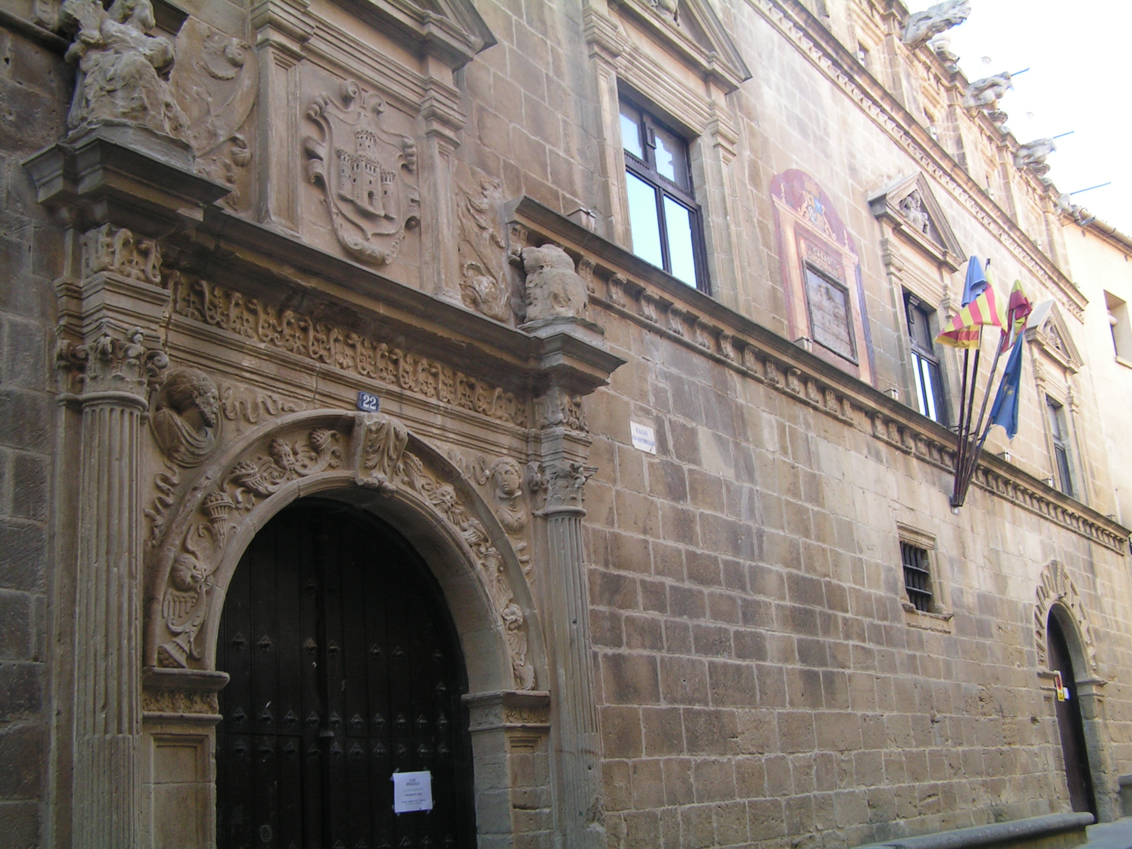 Aragonés: Casa d'a Billa en Uncastiello (Zinco Billas, Aragón), d'estilo renazentista.